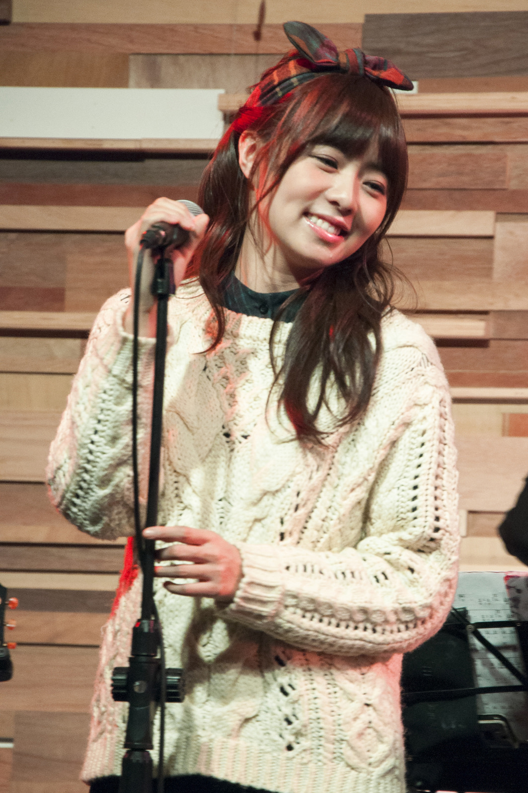 DEARS冬日巡迴演唱會（攝於In Our Time電台食堂，即「駁二特區B10倉庫」）